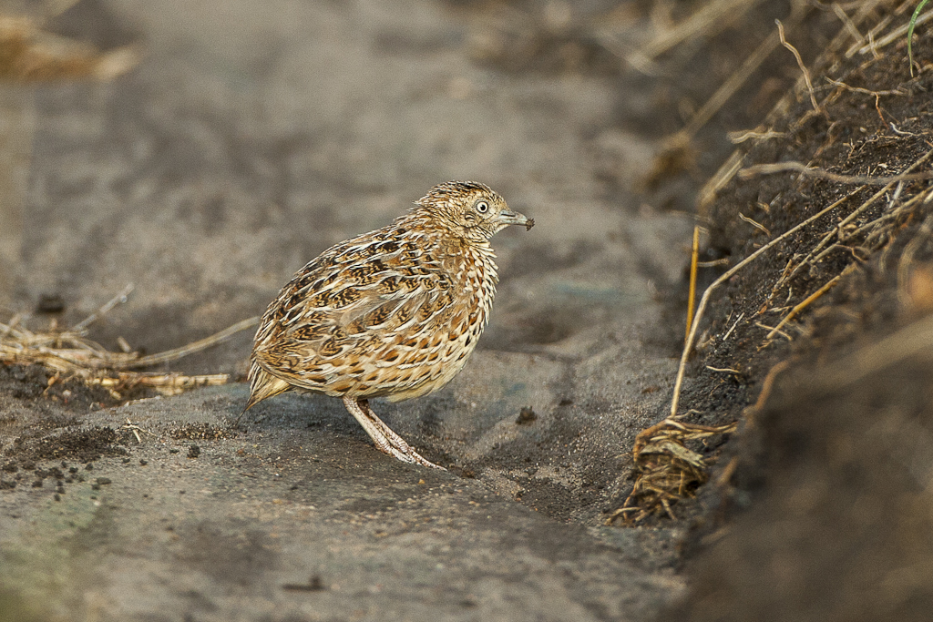 Small Button-quail - Mara - KenyaIMG_2946